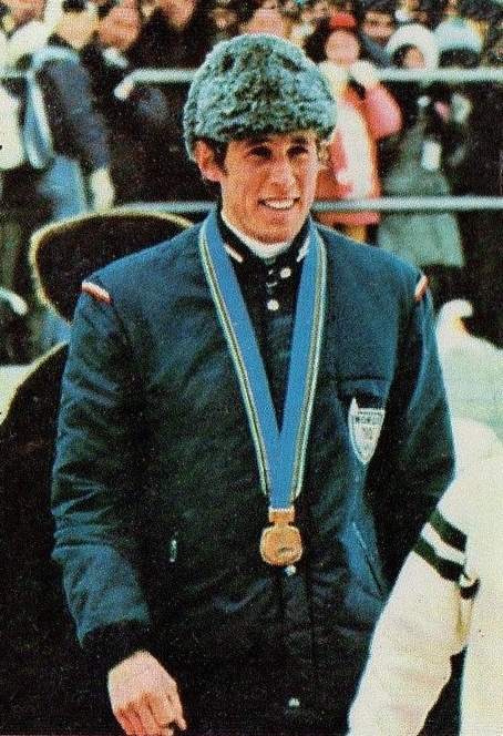 CAMPIONI dello SPORT 1973/74-Figurina n.350- TYLDUM -SPORT INVERNALI-Rec